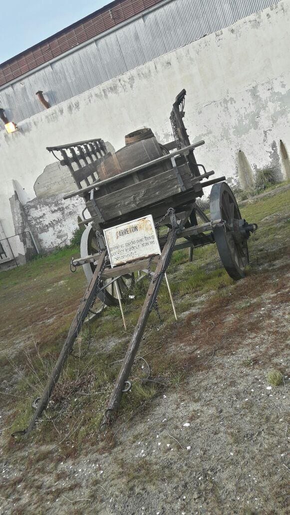 Transporte para desplazar barriles de petróleo en los antiguos campamentos petroleros. Estos eran capaces de soportar diversas cargas de distintos tamaños y pesos. Este elemento se exhibe en el Museo Nacional del Petróleo en la ciudad de Comodoro Rivadavia Museo Nacional del Petroleo